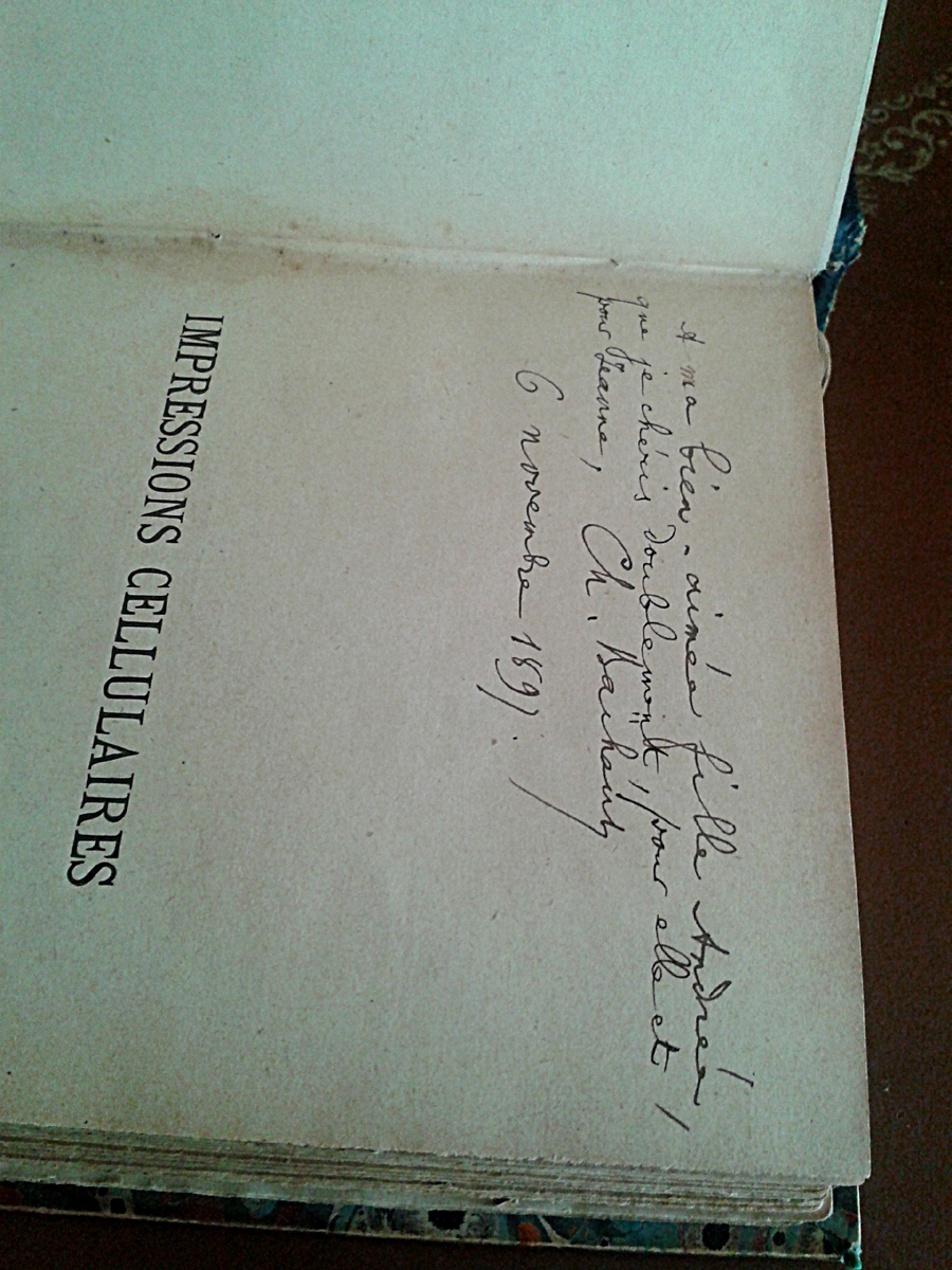 Impressions cellulaire dédicacé à sa fille Andrée.